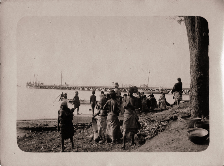 Postcard: Rua da Praia vista do norte: Mulheres papéis esperam as pirogas balantas